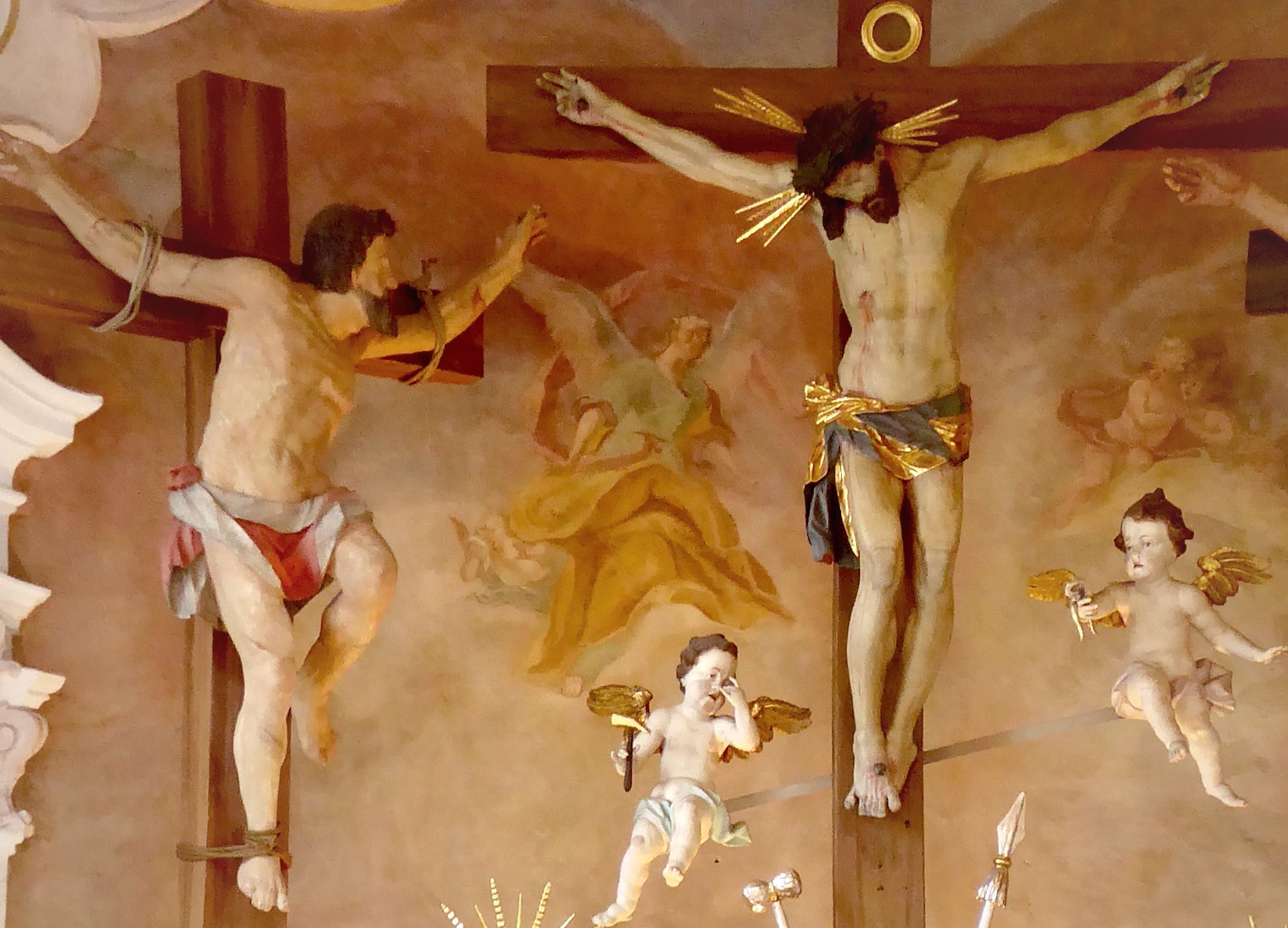 Der Schächer Dismas und der wohl bereits gestorbene Christus in der Wallfahrtskirche Heilig Kreuz Mindelaltheim.